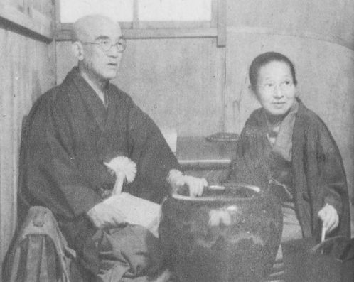 金沢庄三郎・多喜夫妻